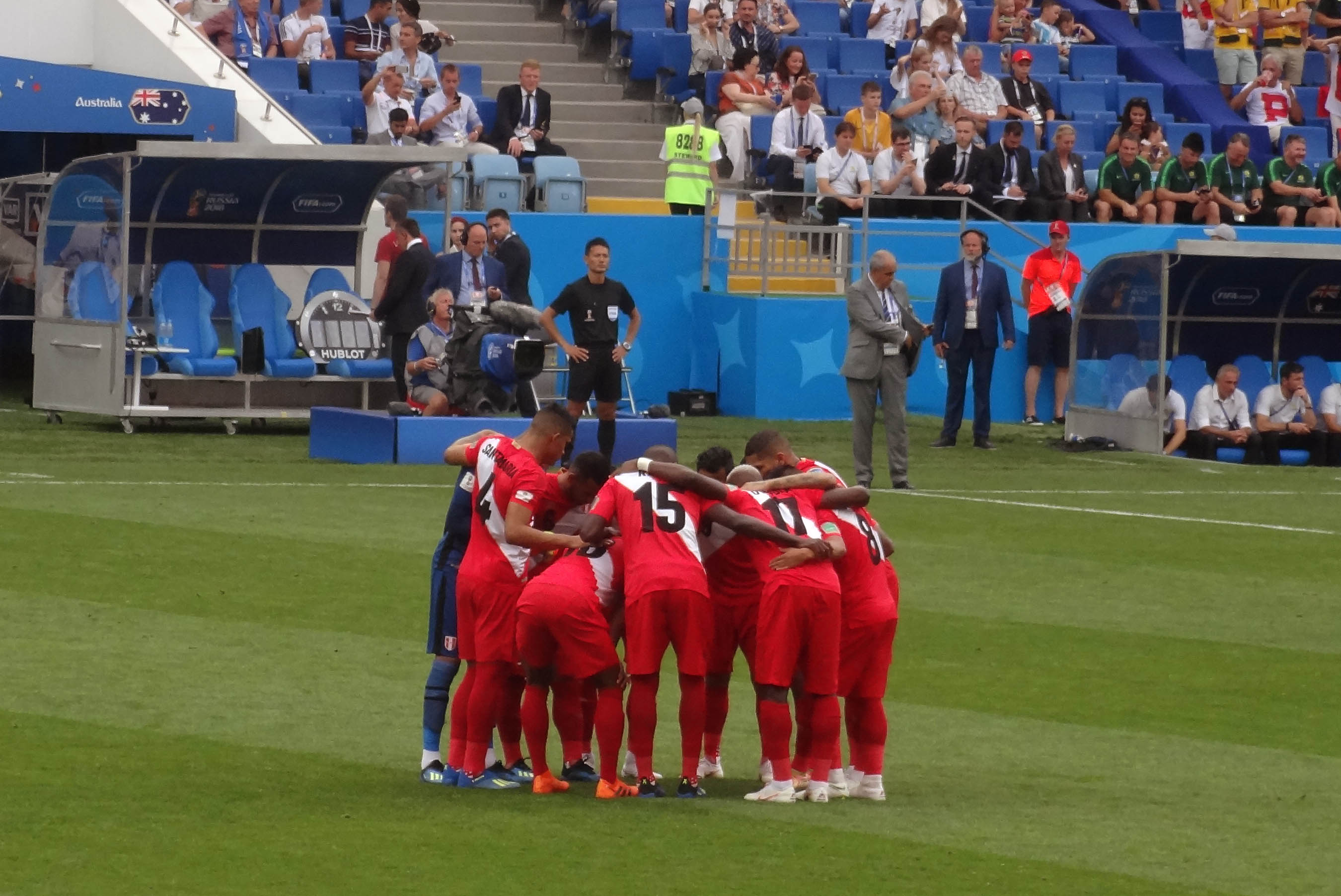 26 июня 2018 года сборная Перу выиграла у сборной Австралии со счётом 2:0, на ЧМ-2018 на стадионе Фишт.